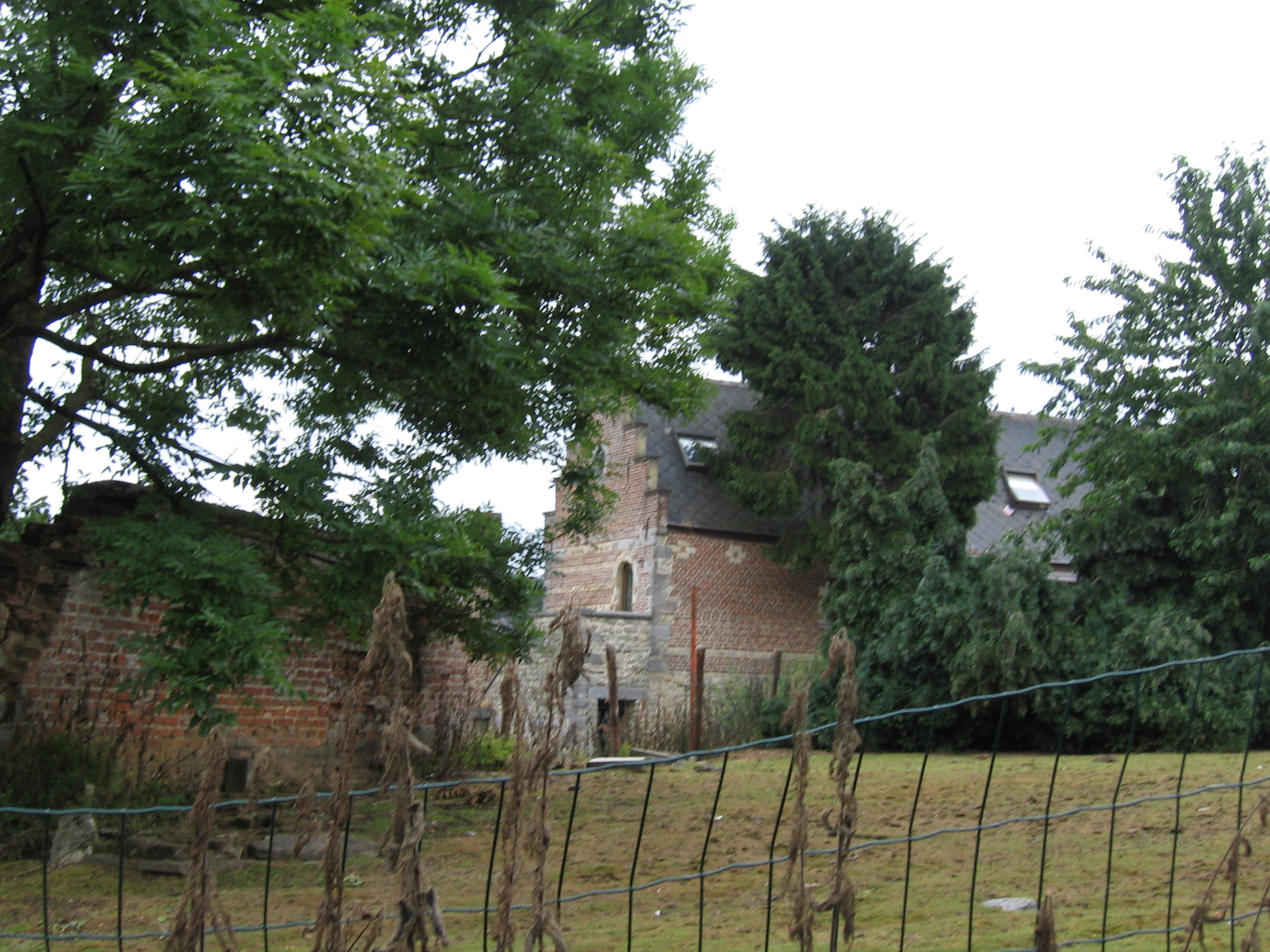 Vestiges de la ferme de l'abbaye cistercienne de Nizelles, à Wauthier-Braine (Belgique)